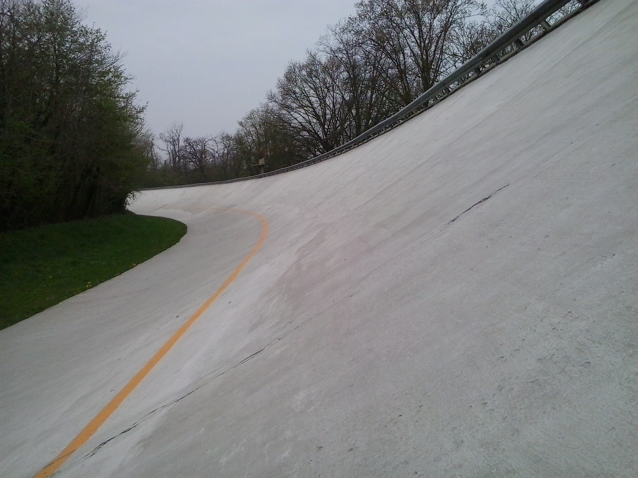 Sopraelevata dell'Autodromo nazionale di Monza